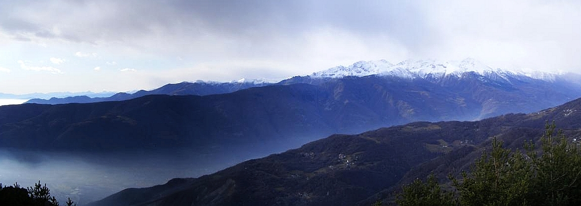 Il gruppo alpino dell'Orsiera (Alpi Cozie) visto dall'Alpe Castelletto (Condove, TO) Unknown